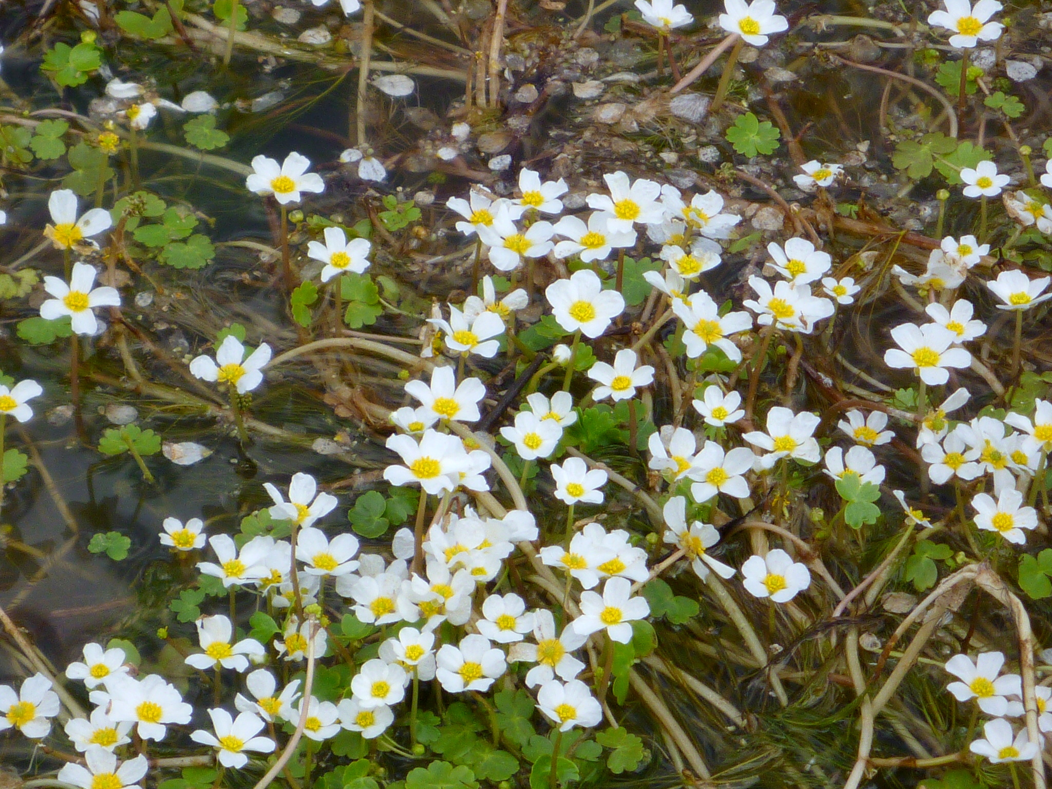 Ranunculus aquatilis. Río Séqua en Moinhos da Rocha (Freguesia de Santo Estevão, Tavira, Algarve, Portugal)